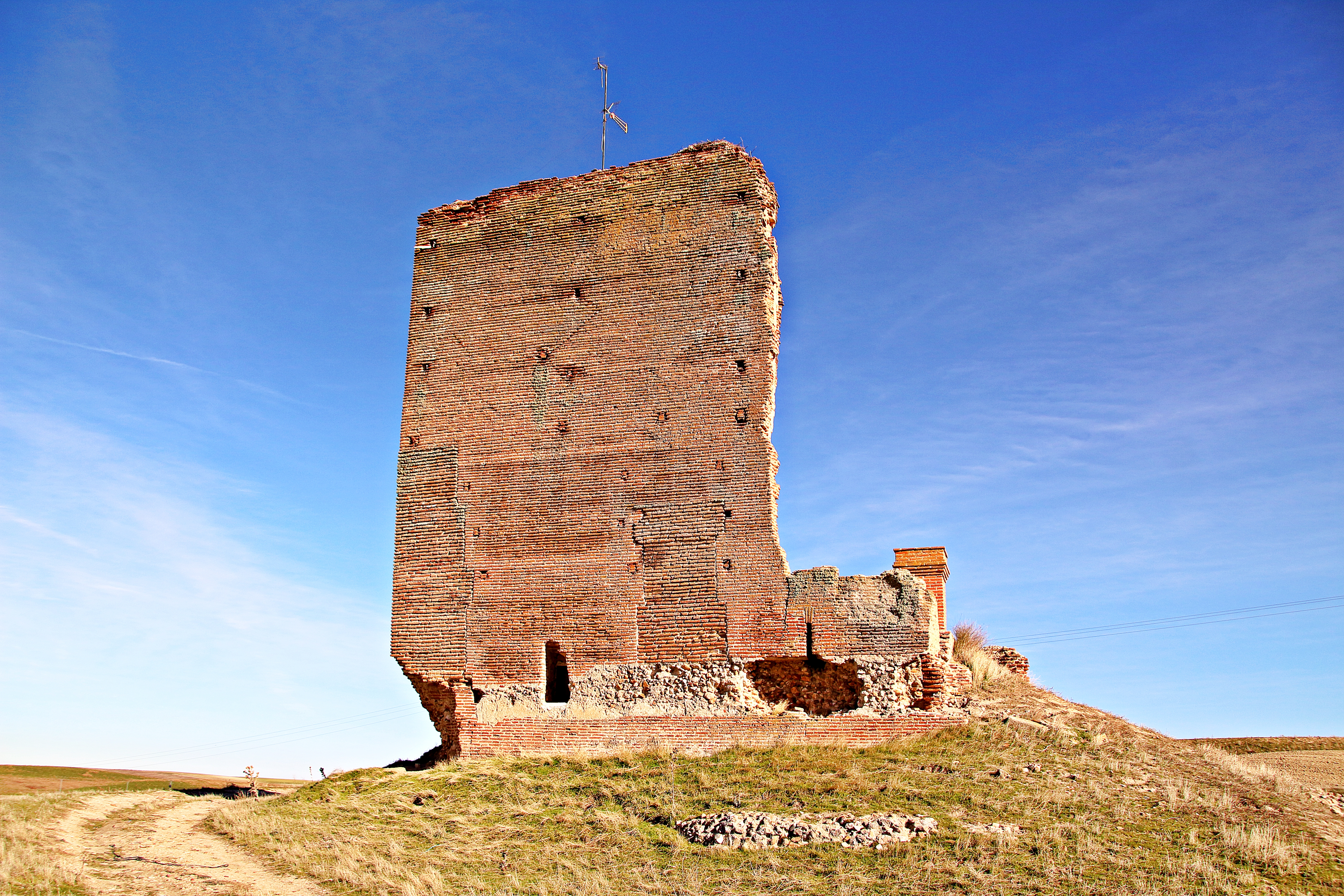 Alquería de Torralba, municipio de Cisla, comarca de La Moraña, provincia de Ávila.